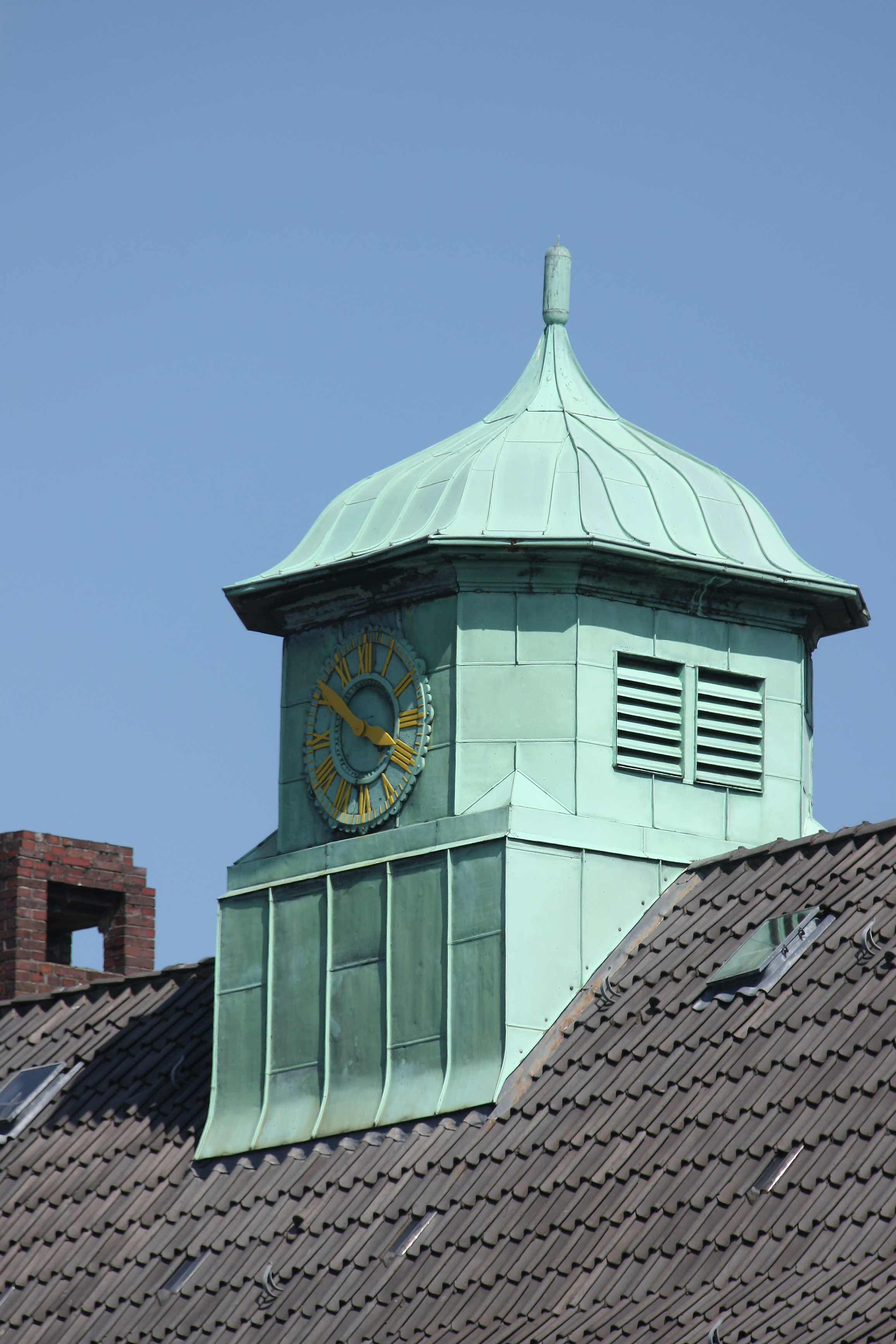 Feuerwache Alsterdorf Westseite, Uhrturm